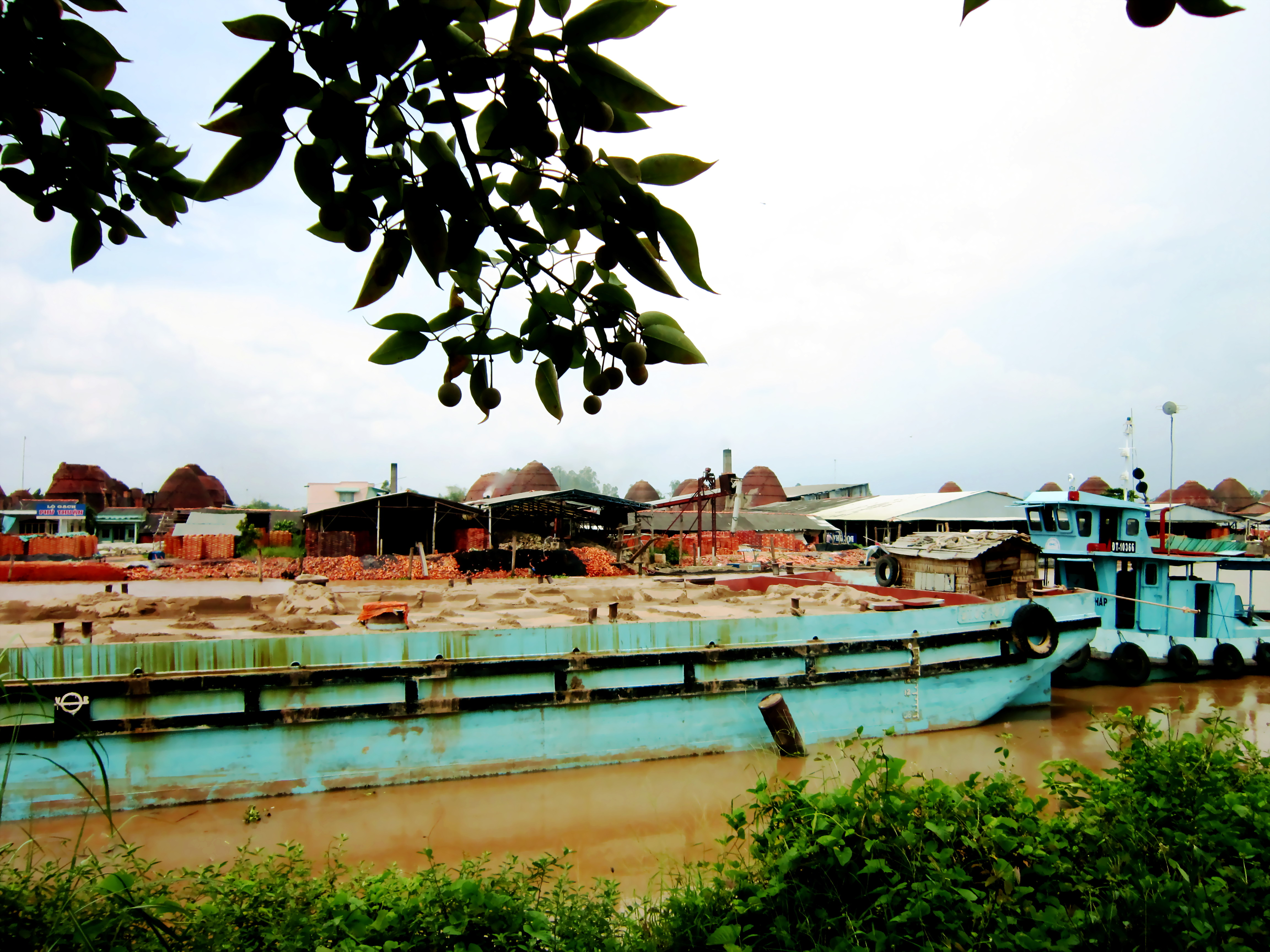 Một khu lò gạch ở xã An Hiệp, huyện Châu Thành, tỉnh Đồng Tháp, Việt Nam.